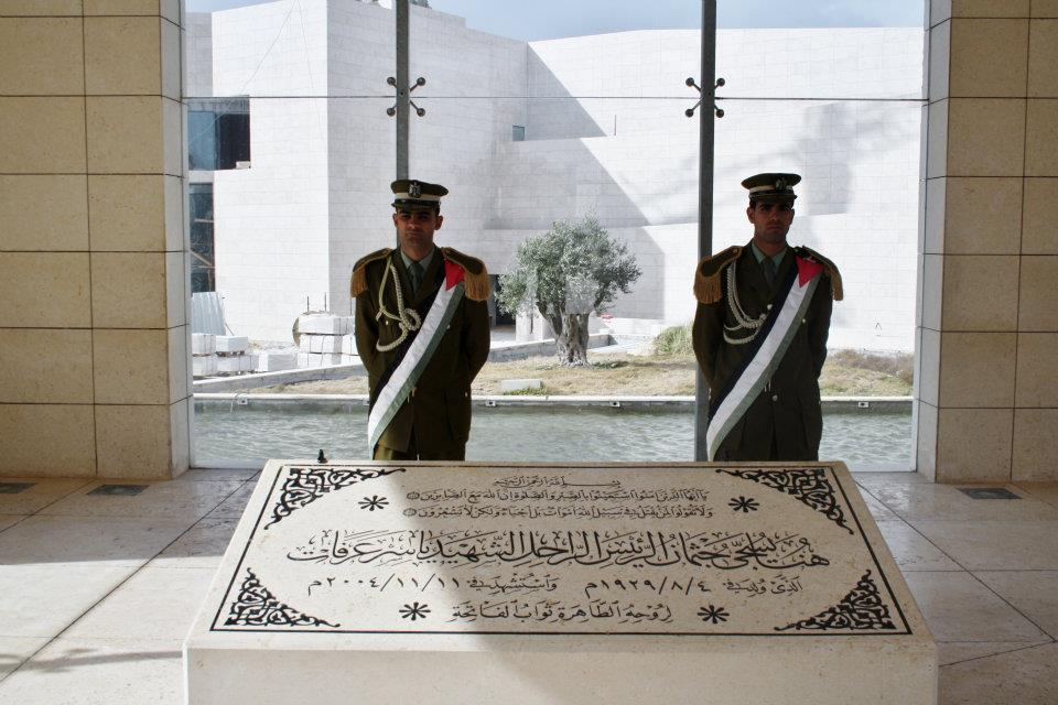 Tombe gardée de Yasser Arafat dans le mausolée où il est inhumé à Ramallah, le gouvernement israélien ayant refusé qu’il soit enterré à Jérusalem.